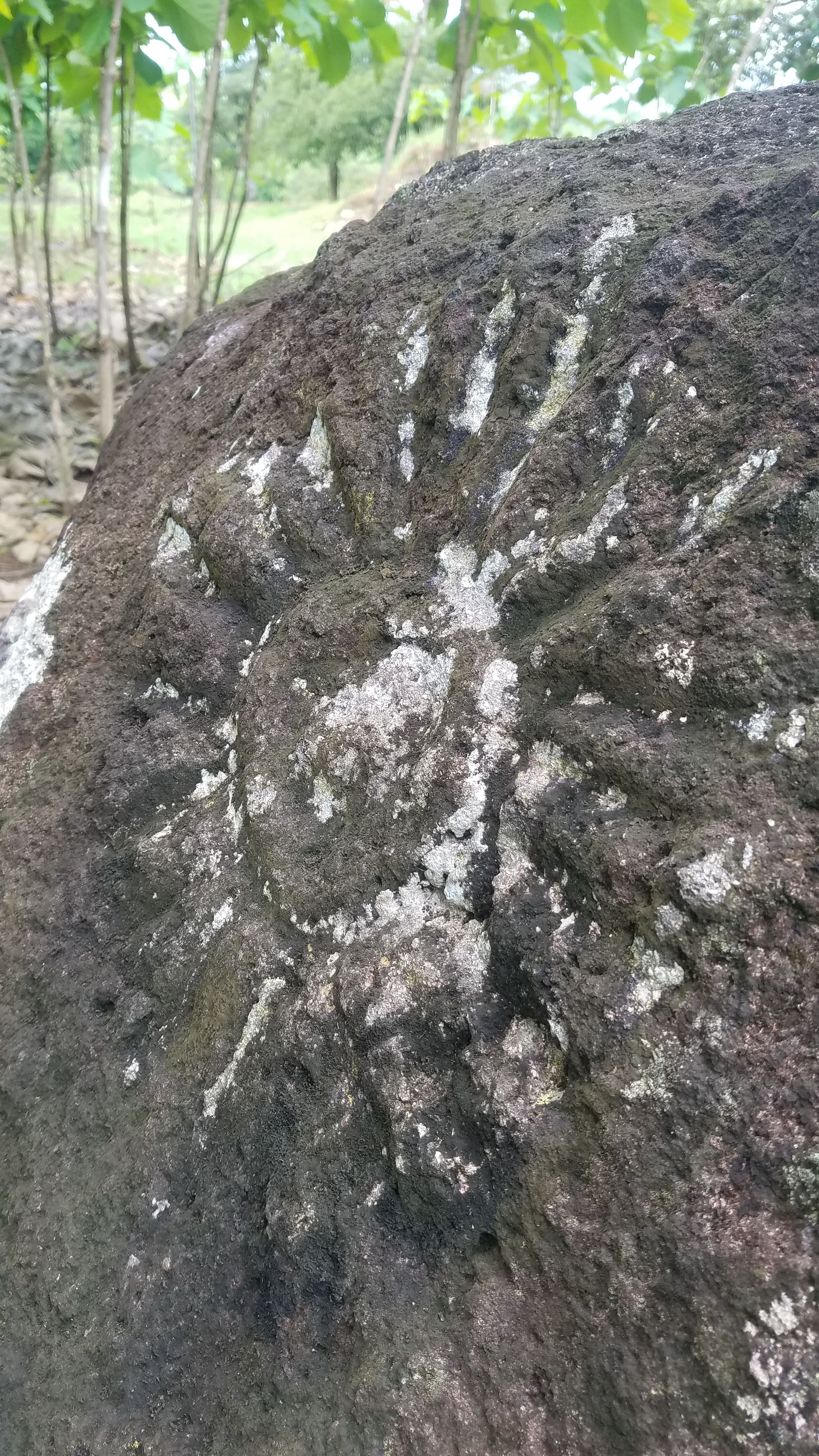 posee 2,000 años de antigüedad